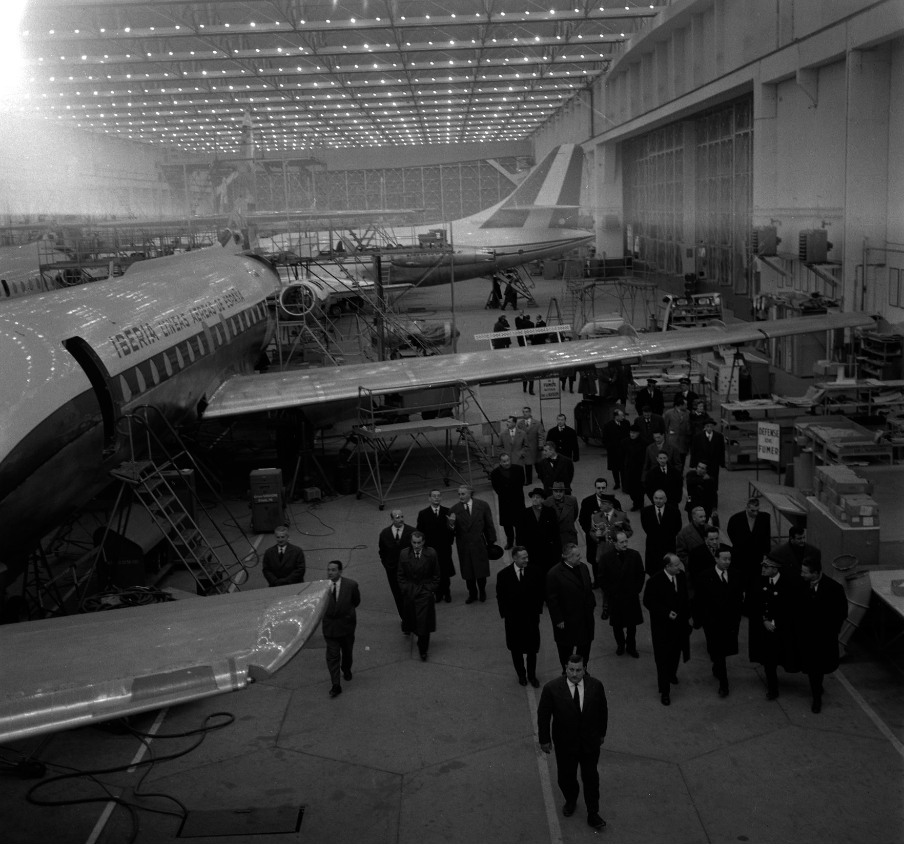 Hangar de l'aéroport Toulouse-Blagnac. Le 2 et 3 février 1962. Vue de Michel Debré, Louis Bazerque et du préfet Morin en visite dans un hangar de Caravelles.